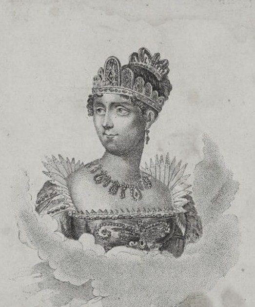 Варвара Петровна Всеволожская, ур. Хованская (1805—19.11.1834) (гравюра, изображена в облаках в княжеской короне и богатом колье с жемчугами).